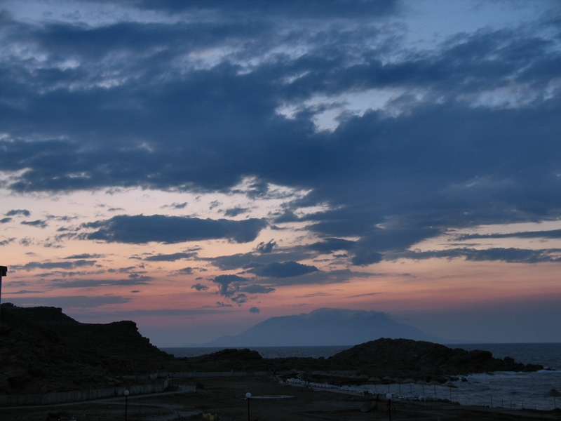 Gokceada